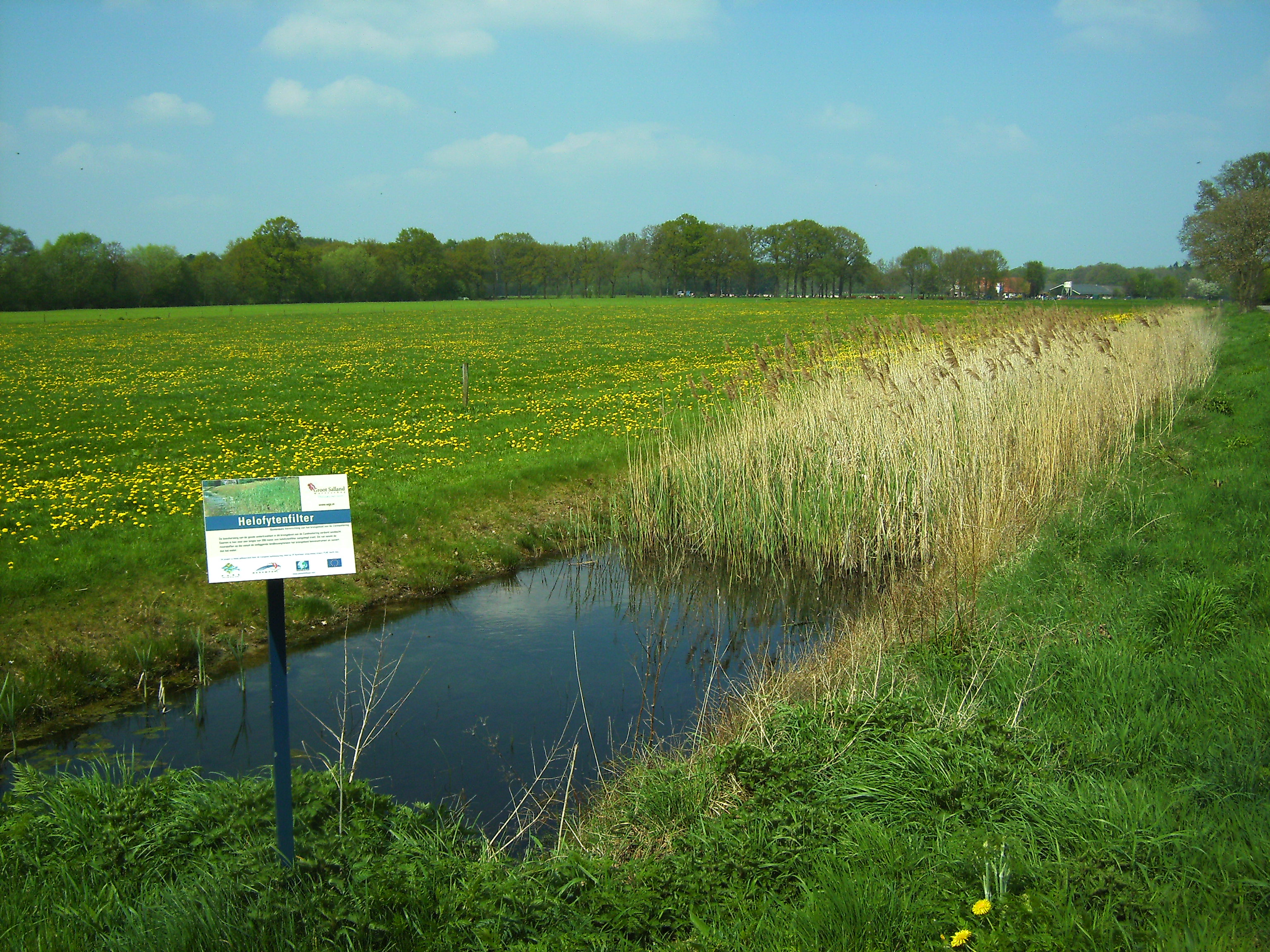 Helofytenfilter door het waterschap Groot Salland aangelegd in een sloot bij de Zandwetering in het gebied Gooikersmars bij Deventer